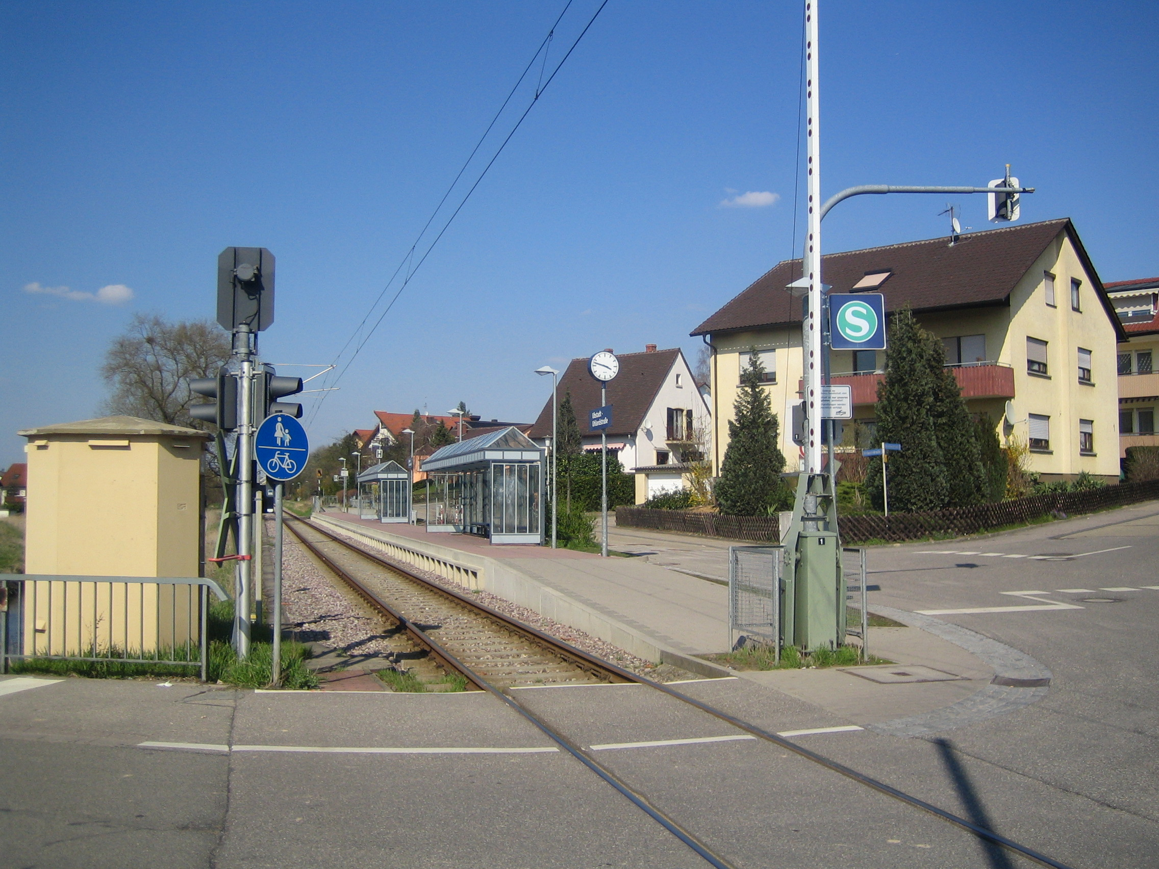 Hp. "Ubstadt Uhlandstr.", selbst fotografiert